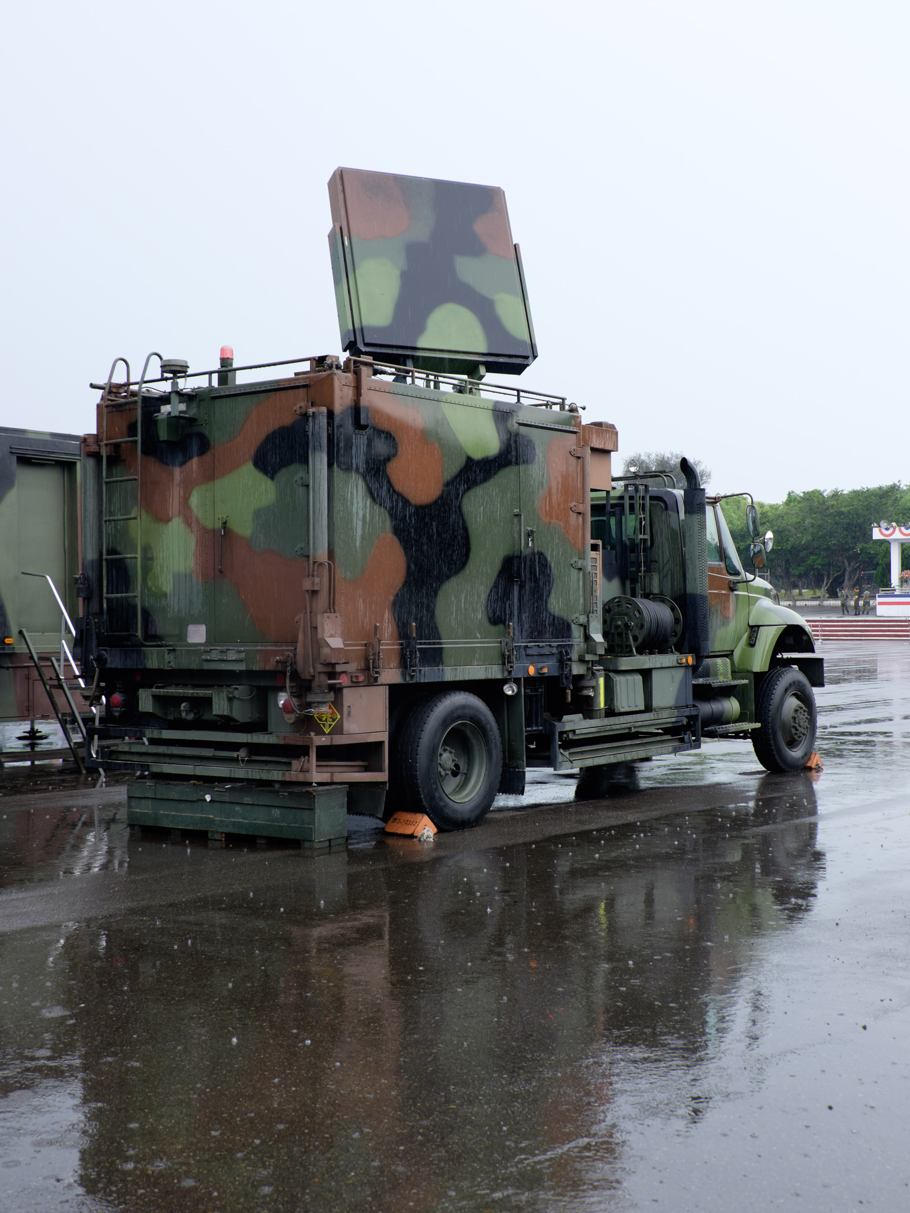 2015年成功嶺營區開放活動，介壽臺大校場展示陸軍蜂眼雷達系統車右後方。